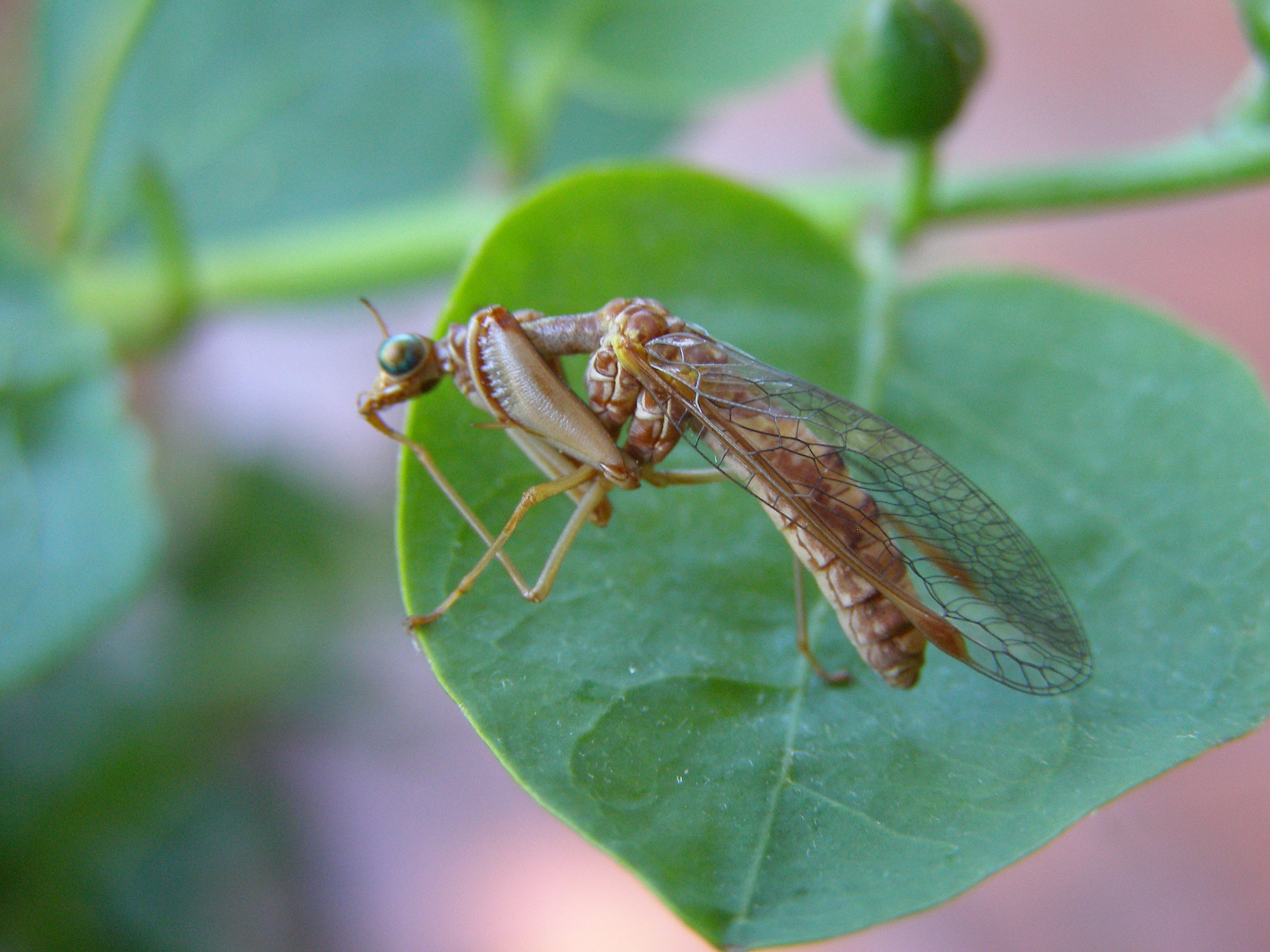 Mantispa styriaca (Neuroptera, Mantispidae) à sa toilette sur une feuille de câprier